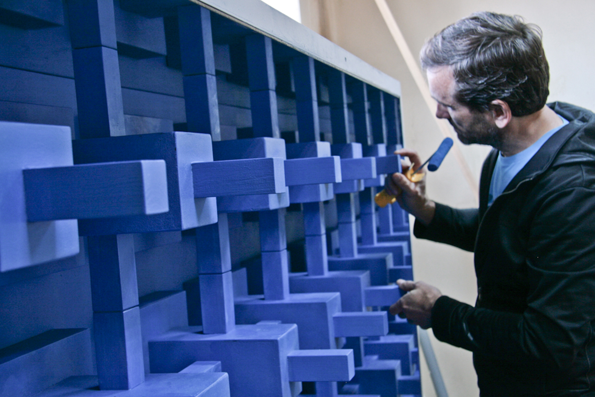 2012, змішана техніка, 126х201х38 см.